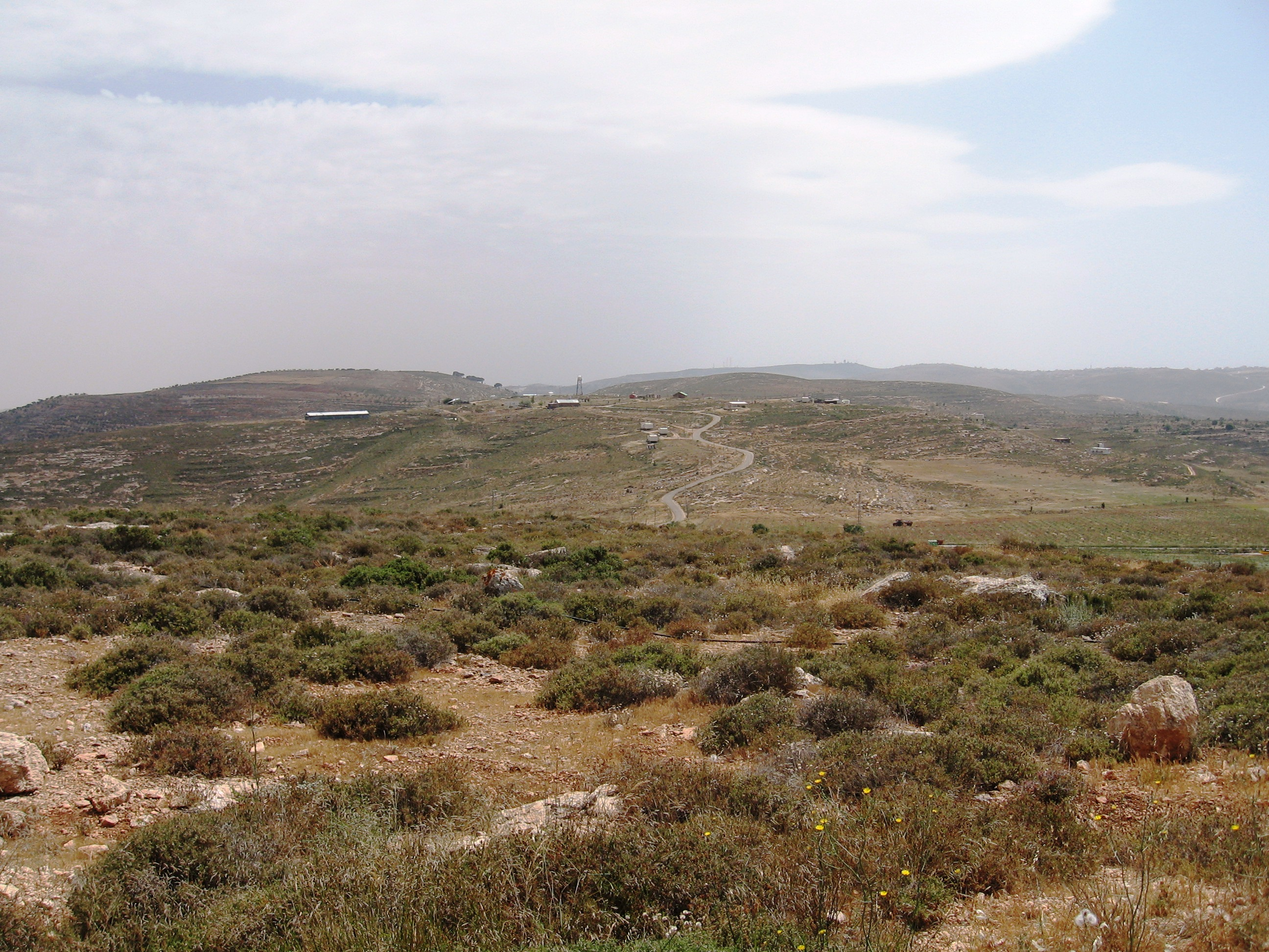 kida village Shiloh Bloc